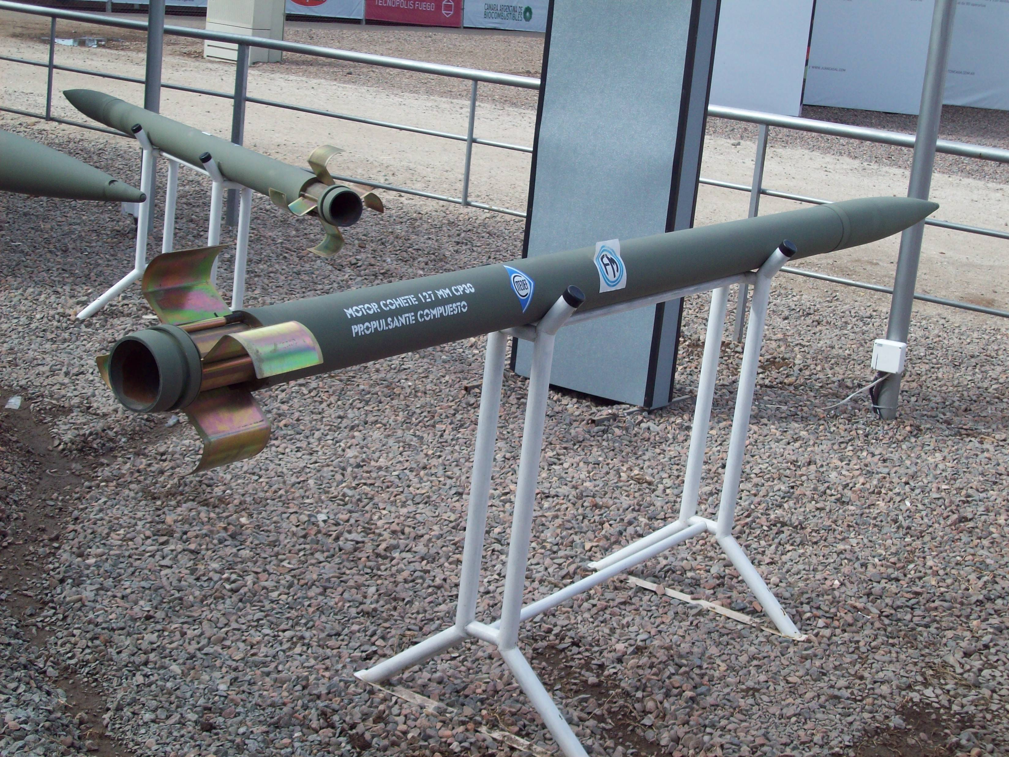 Cohete o misil de 127 mm en Tecnópolis.